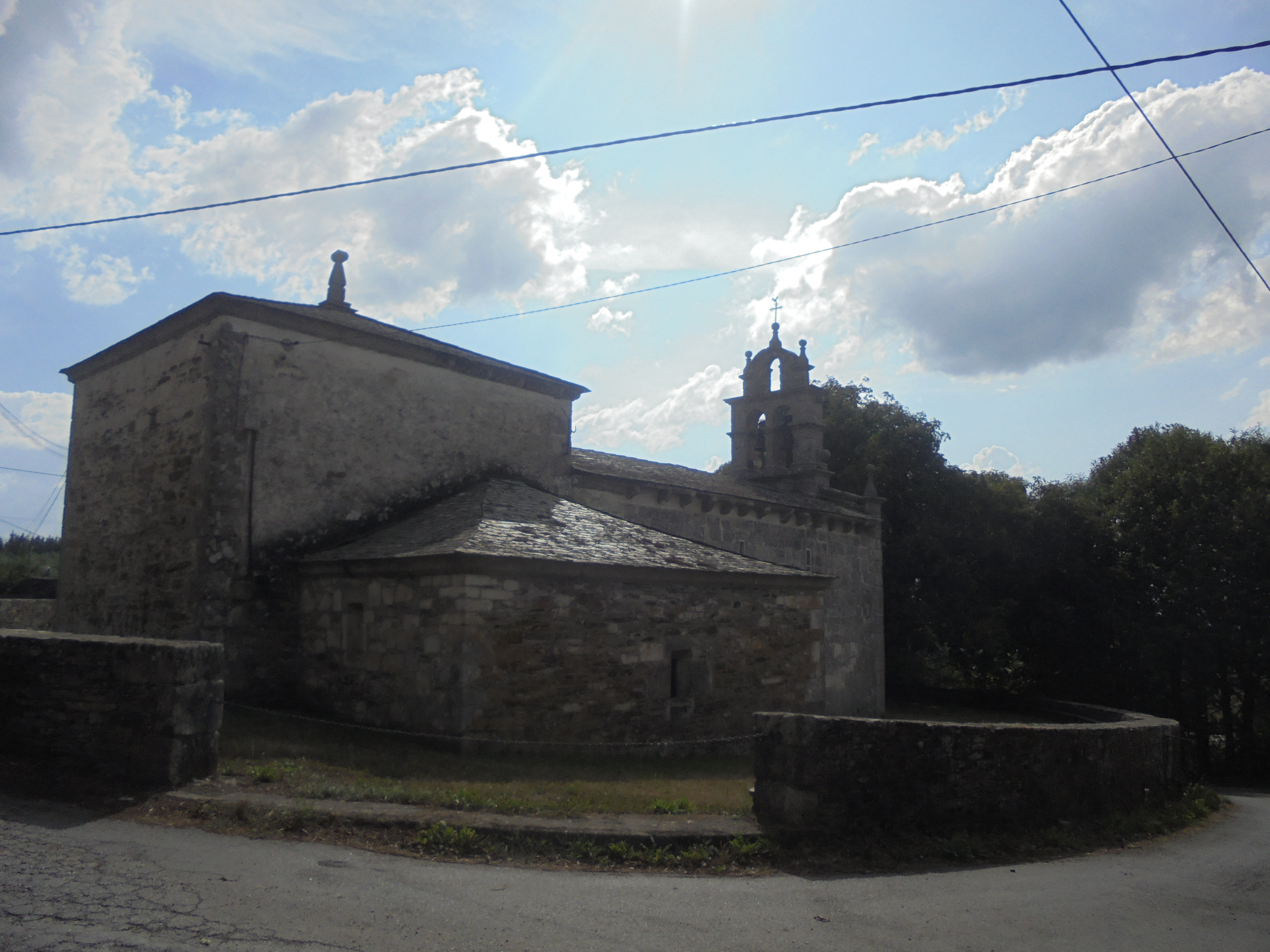 igrexa parroquial de Cirio ( Pol )